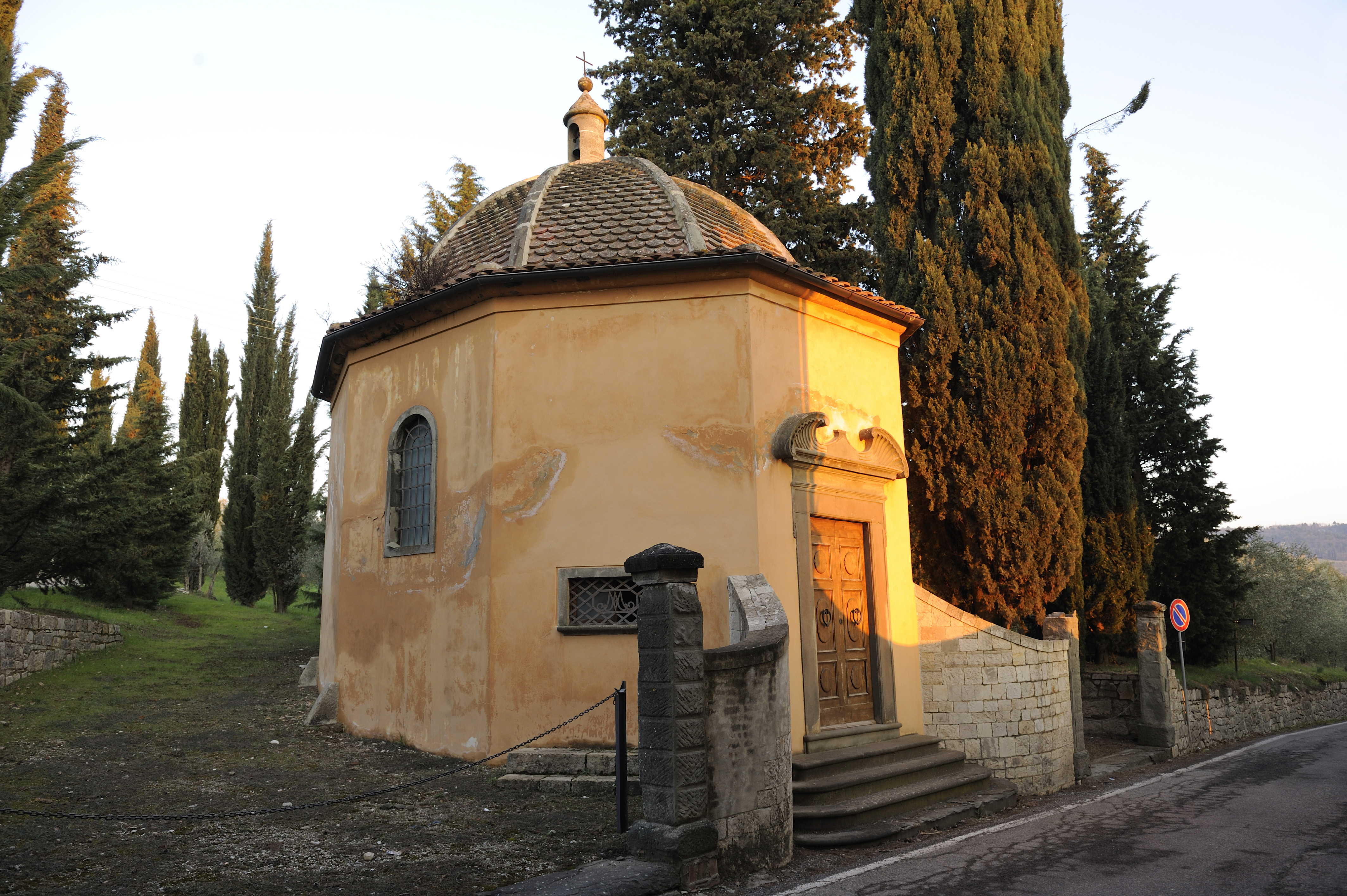 Cappella dei Marcellini (Mercatale in Val di Pesa)